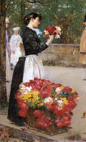 Flower Girl by Childe Hassam 1888.jpg